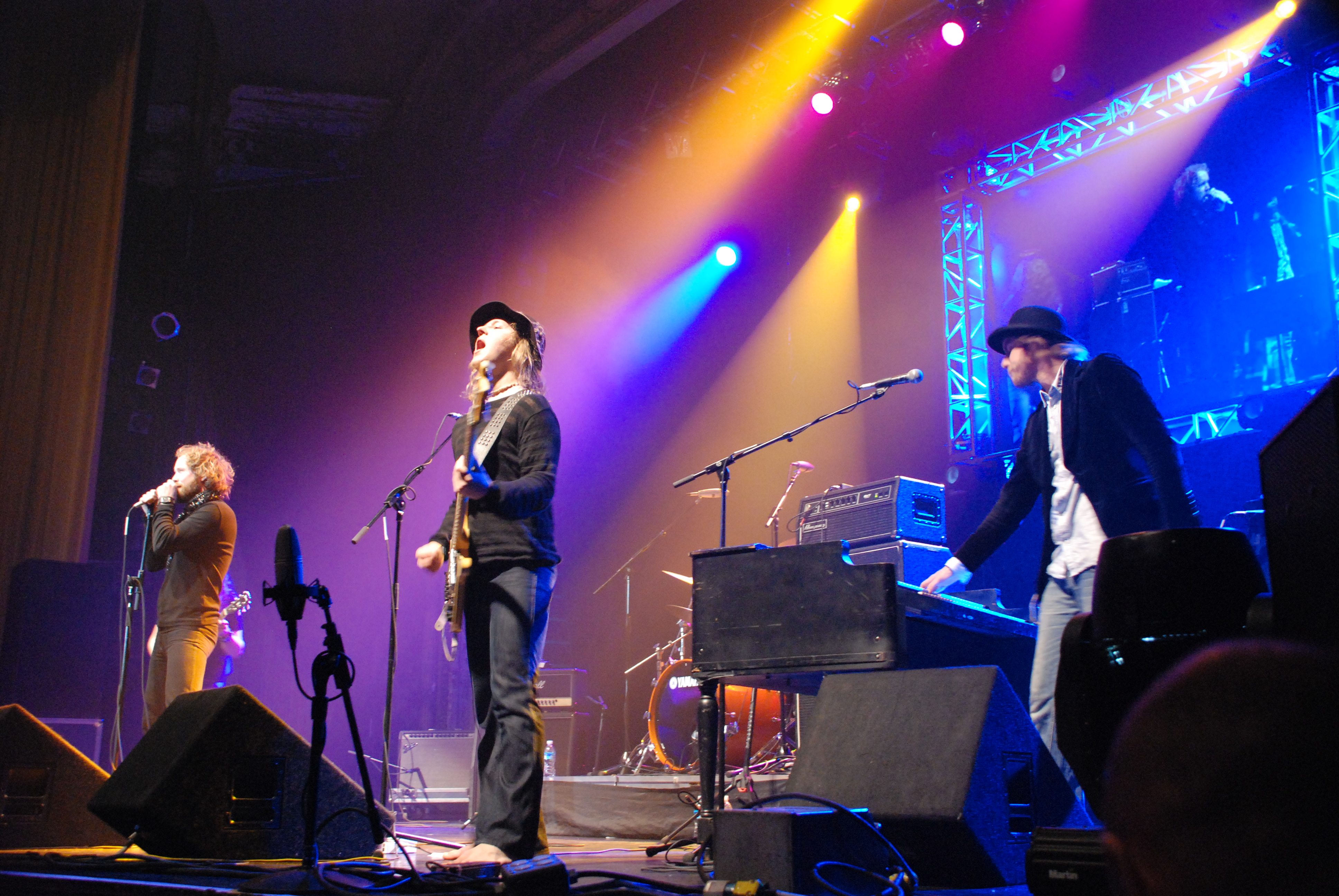 Black Bonzo - RoSFest 2008